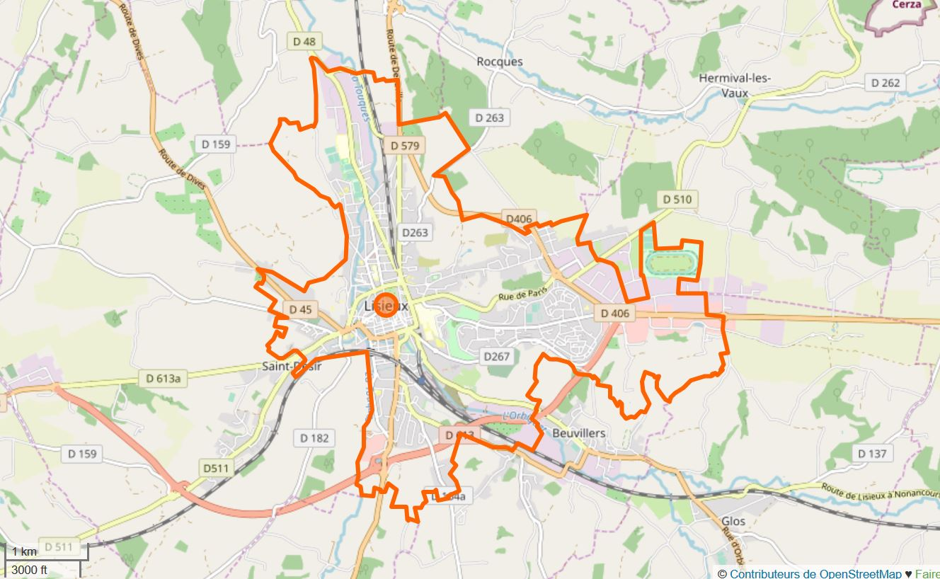 Cette carte a été créée à partir des données du projet openstreetmap. This map may be incomplete, and may contain errors. Don't rely solely on it for navigation.